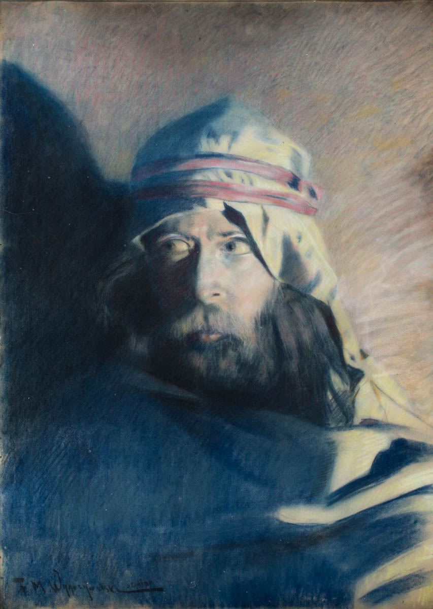 autoportret Feliksa Michała Wygrzywalskiego (1875–1944); technika mieszana na papierze, wymiary oryginału: 68 x 49 cm sygnowane l.d.: F.M. Wygrzywalski